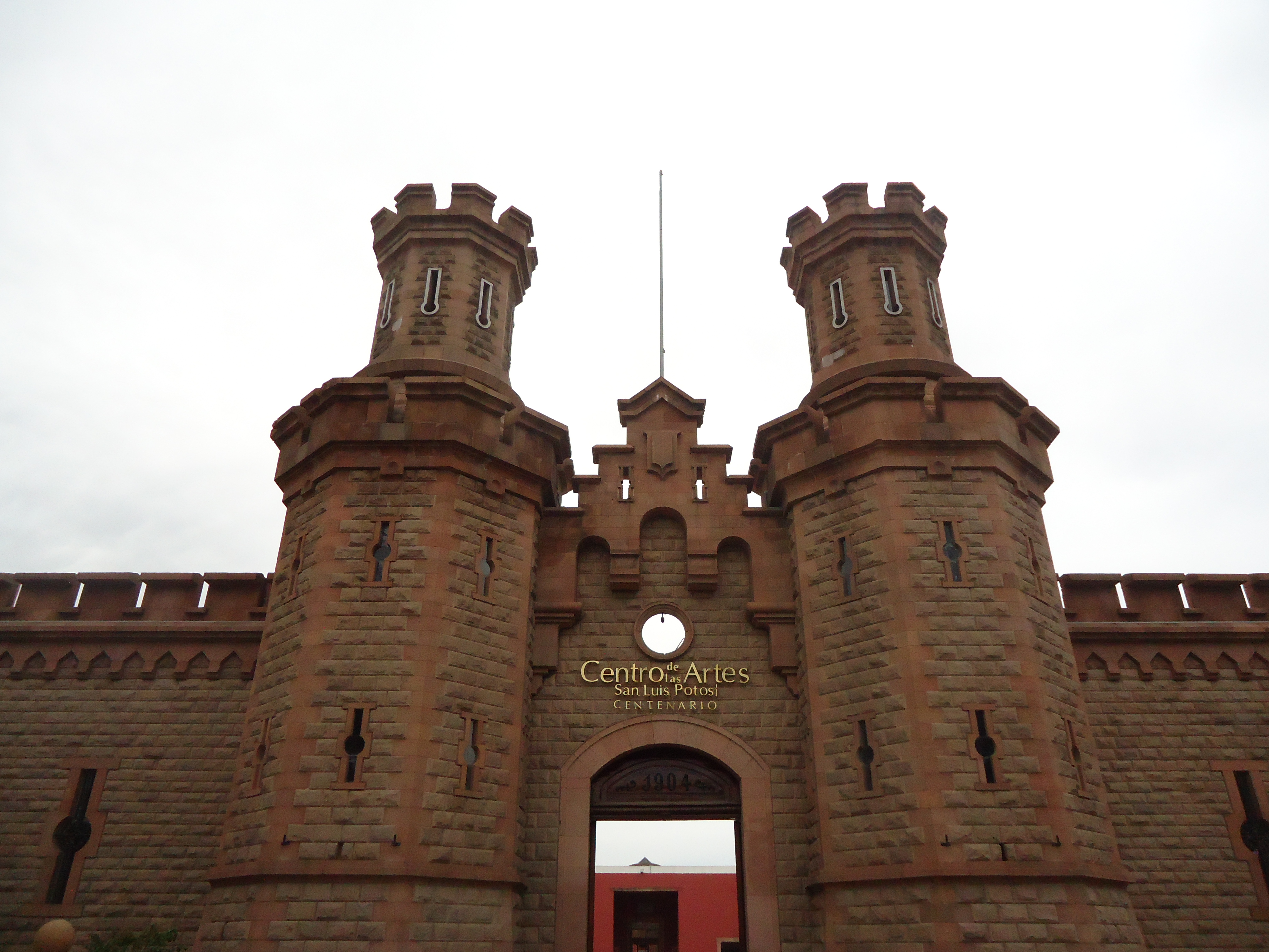 Fachada del Centro de las Artes de San Luis Potosí, San Luis Potosí México